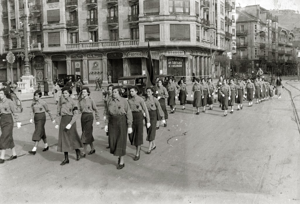 Título original: Desfile militar de los diferentes cuerpos del Frente Nacional por las calles de San Sebastián (4/6) Localización: San Sebastián (Guipúzcoa)